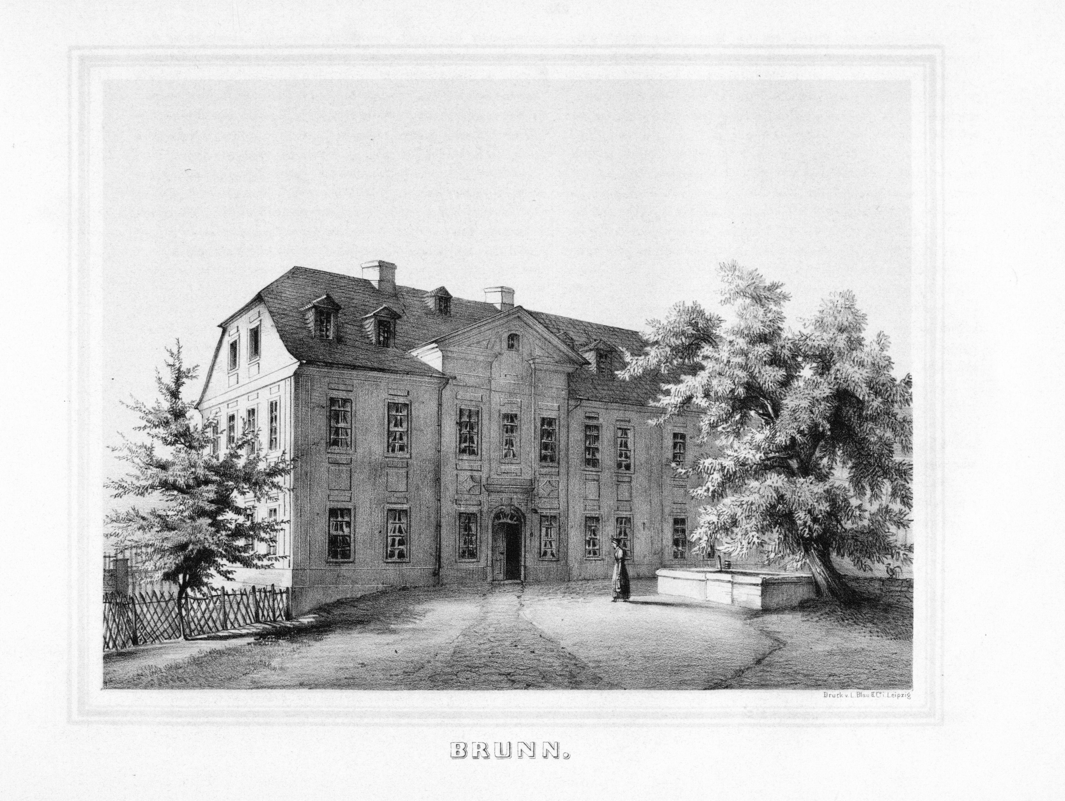 Brunn aus: Album der Rittergüter und Schlösser im Königreiche Sachsen Voigtländischer Kreis Section: V